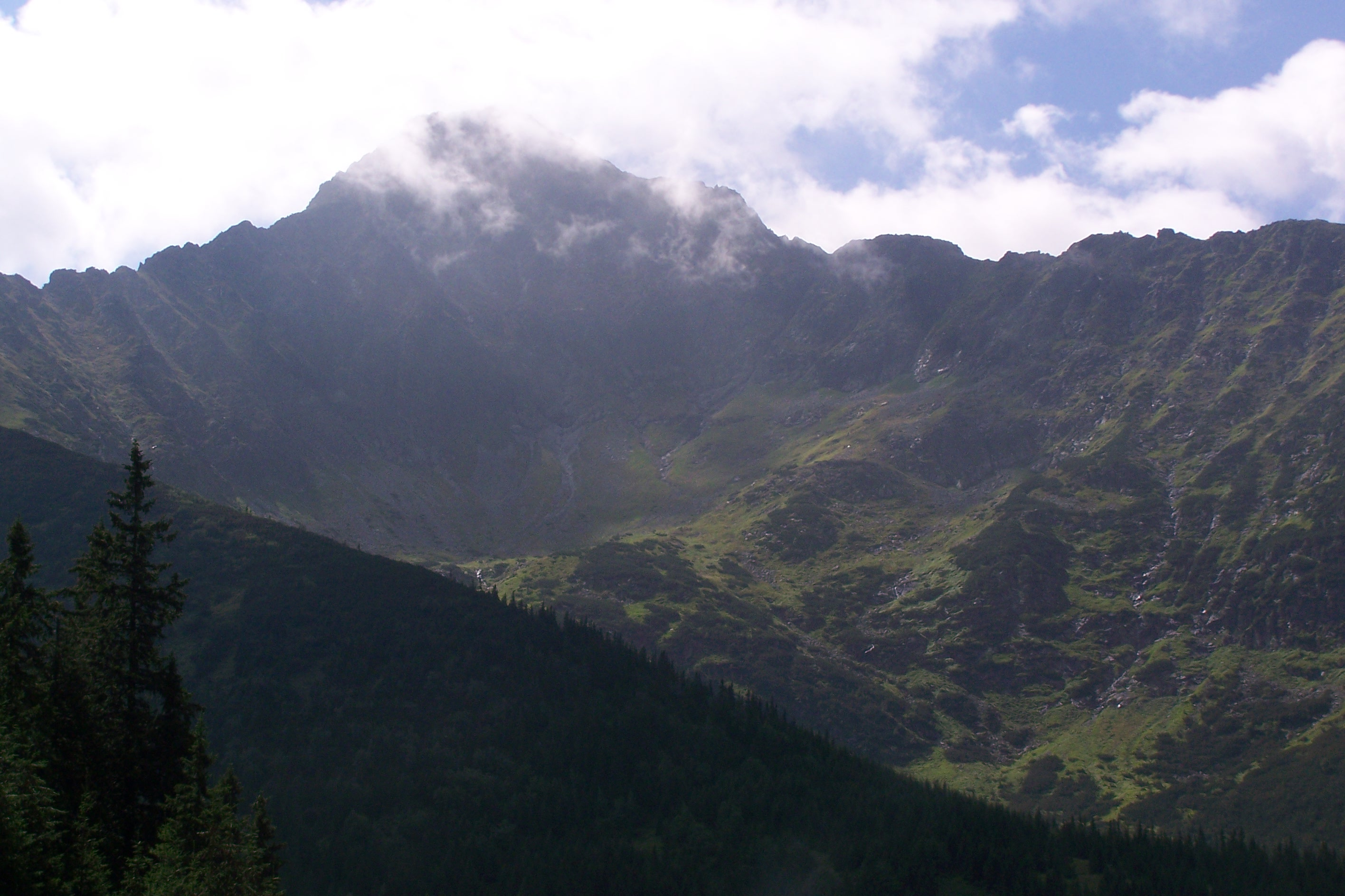 Jagnięcy Kocioł z Zadnich Koperszadów (w chmurach Jagnięcy Szczyt)